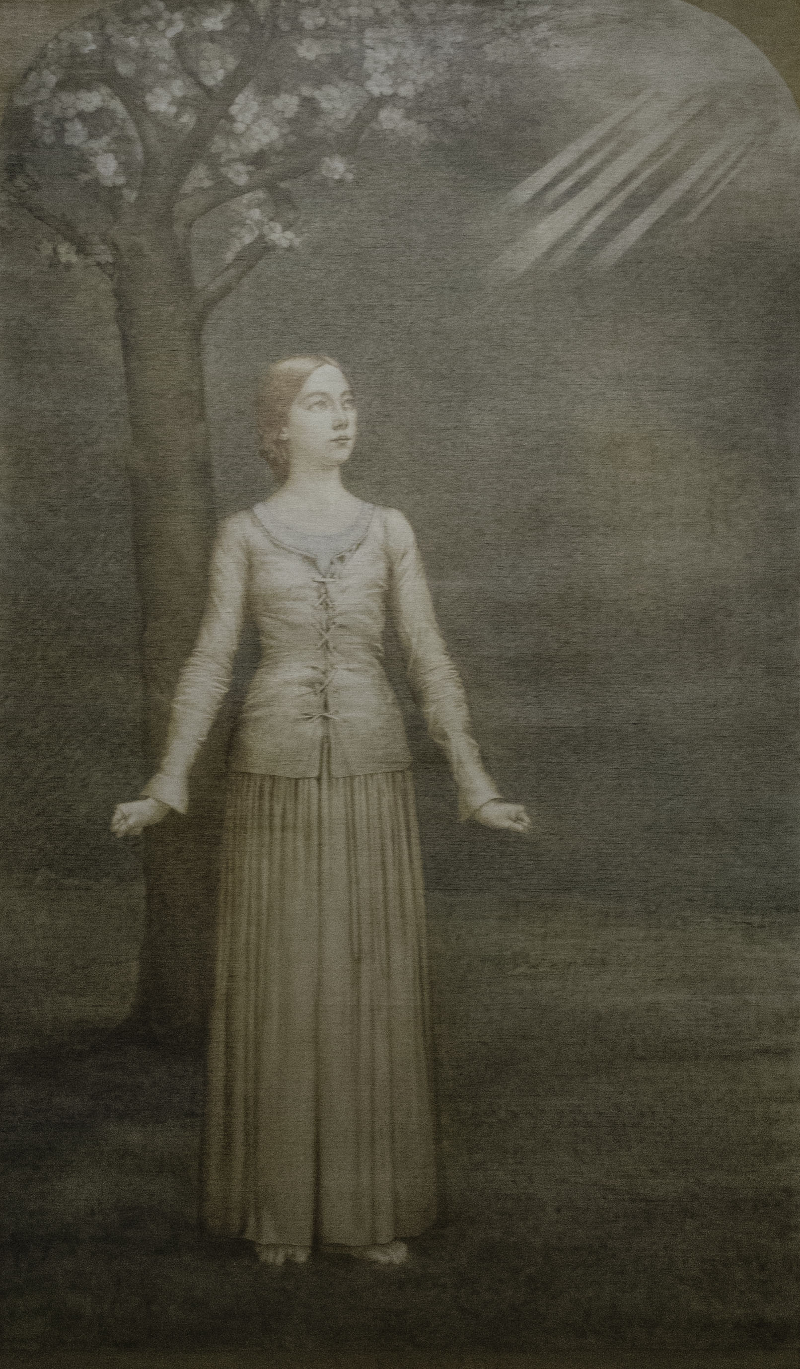 Alexandre Séon (1855-1917), Jeanne d’Arc, collection privée.